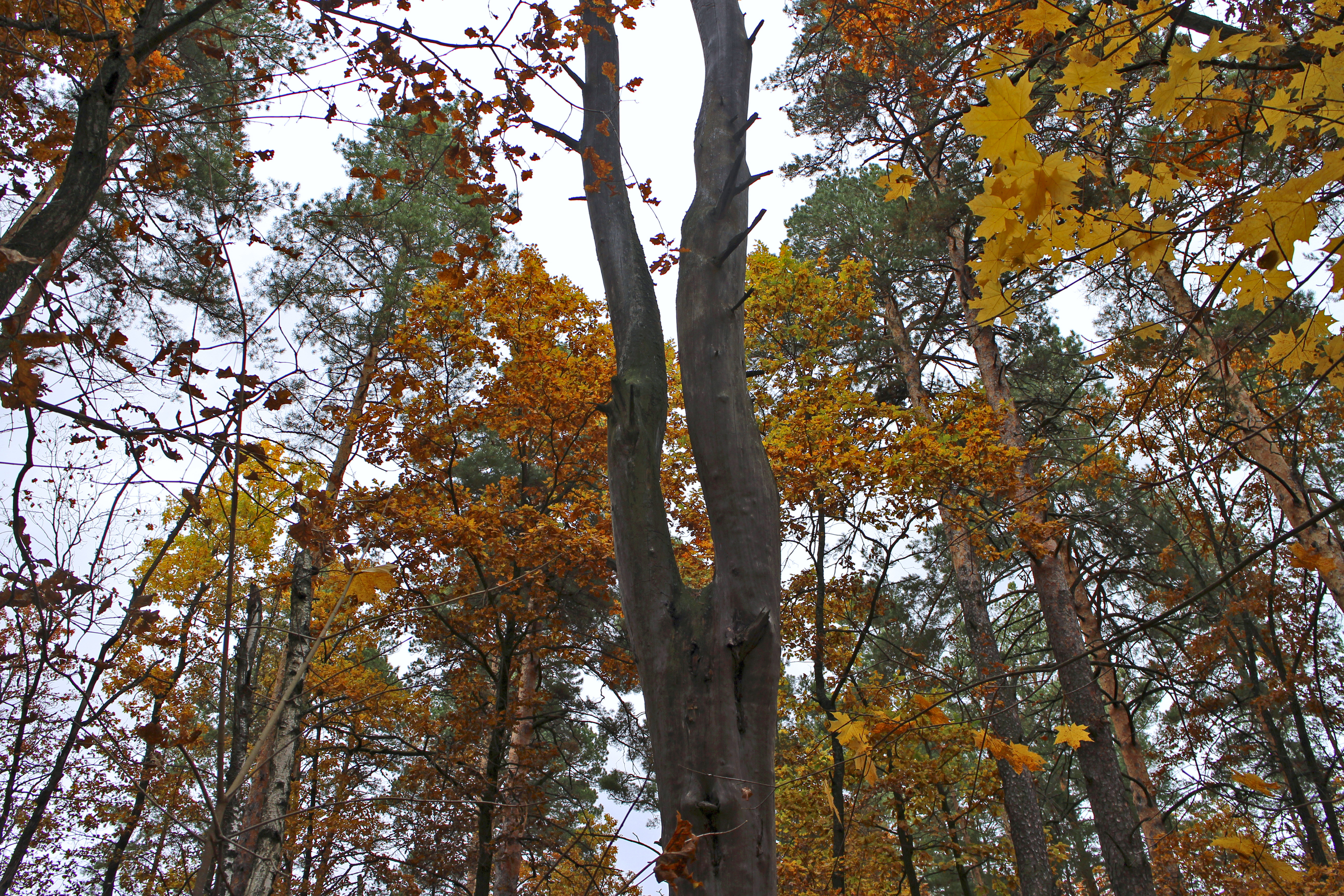 Эталонный участок высокопродуктивного хвойного насаждения сосны обыкновенной: Горельский лесхоз, Тулиновское лес-во, кв. 186 (выд. 14), Тамбов, Тамбовский район, Тамбовская область This image is related to the protected area of Russia number 6810098